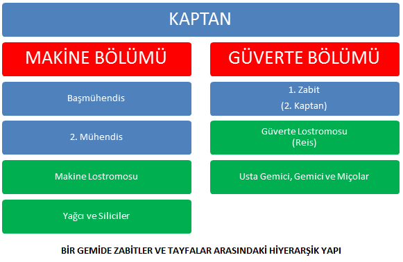 Bir ticari gemide tayfaların bağlı bulunduğu organizasyonel hiyerarşi